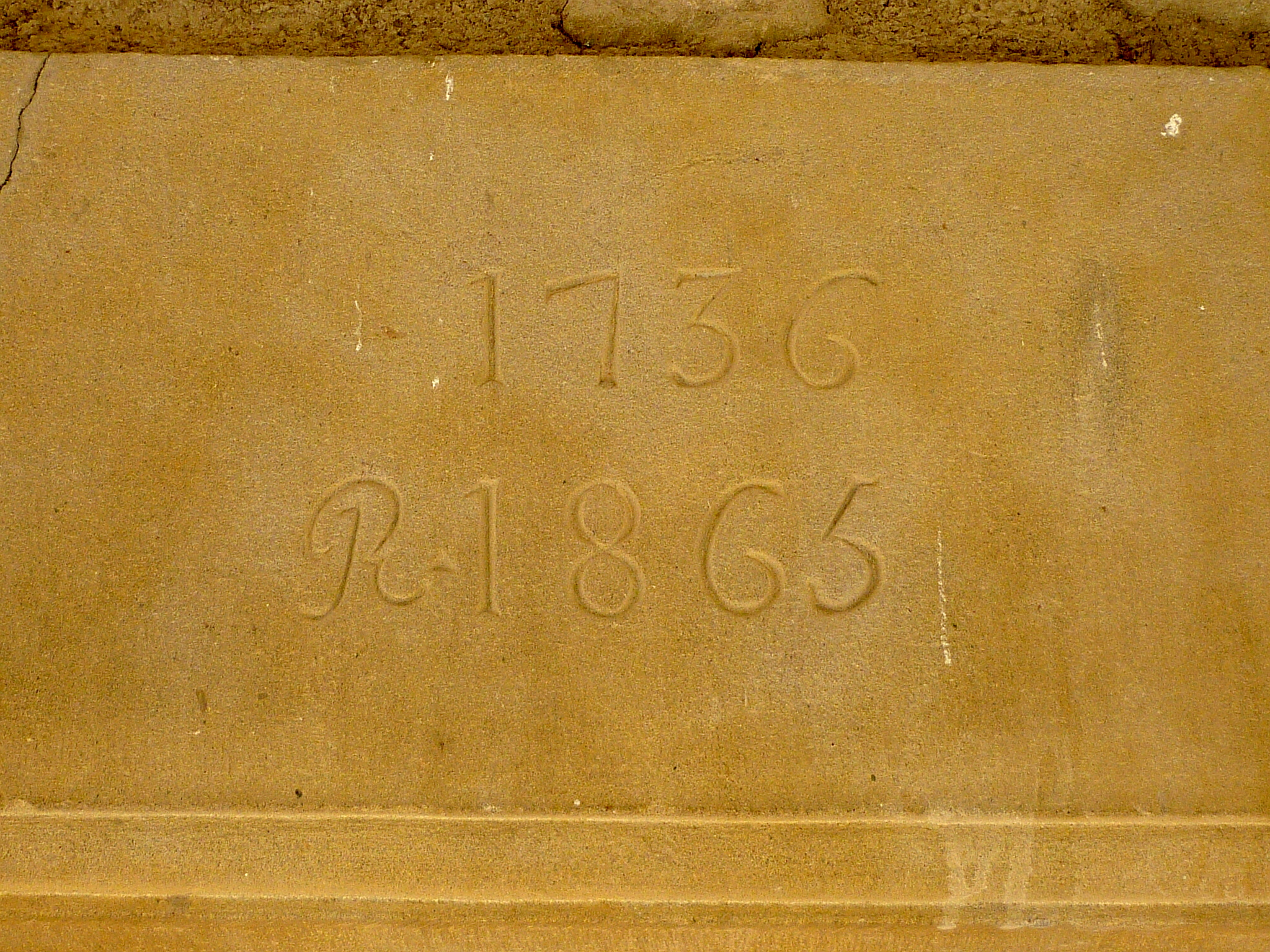 Capella de Sant Bernat (Solsona): inscripció a la llinda